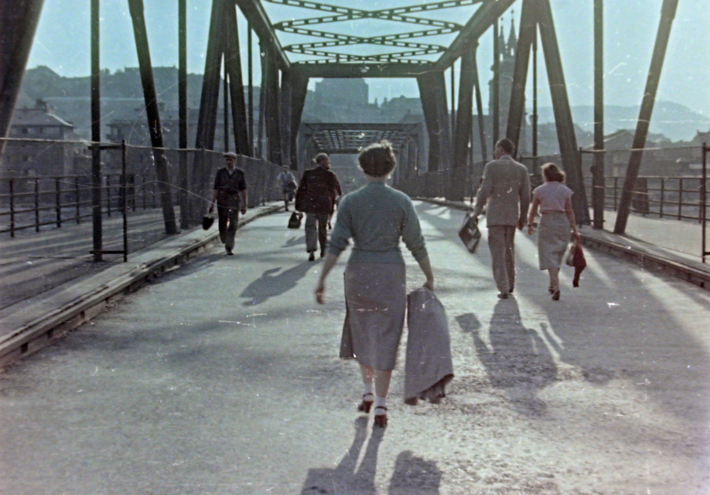 Kossuth híd a Bem rakpart felé nézve. Location: Hungary, Budapest Tags: colorful, bridge Title: Kossuth híd a Bem rakpart felé nézve.